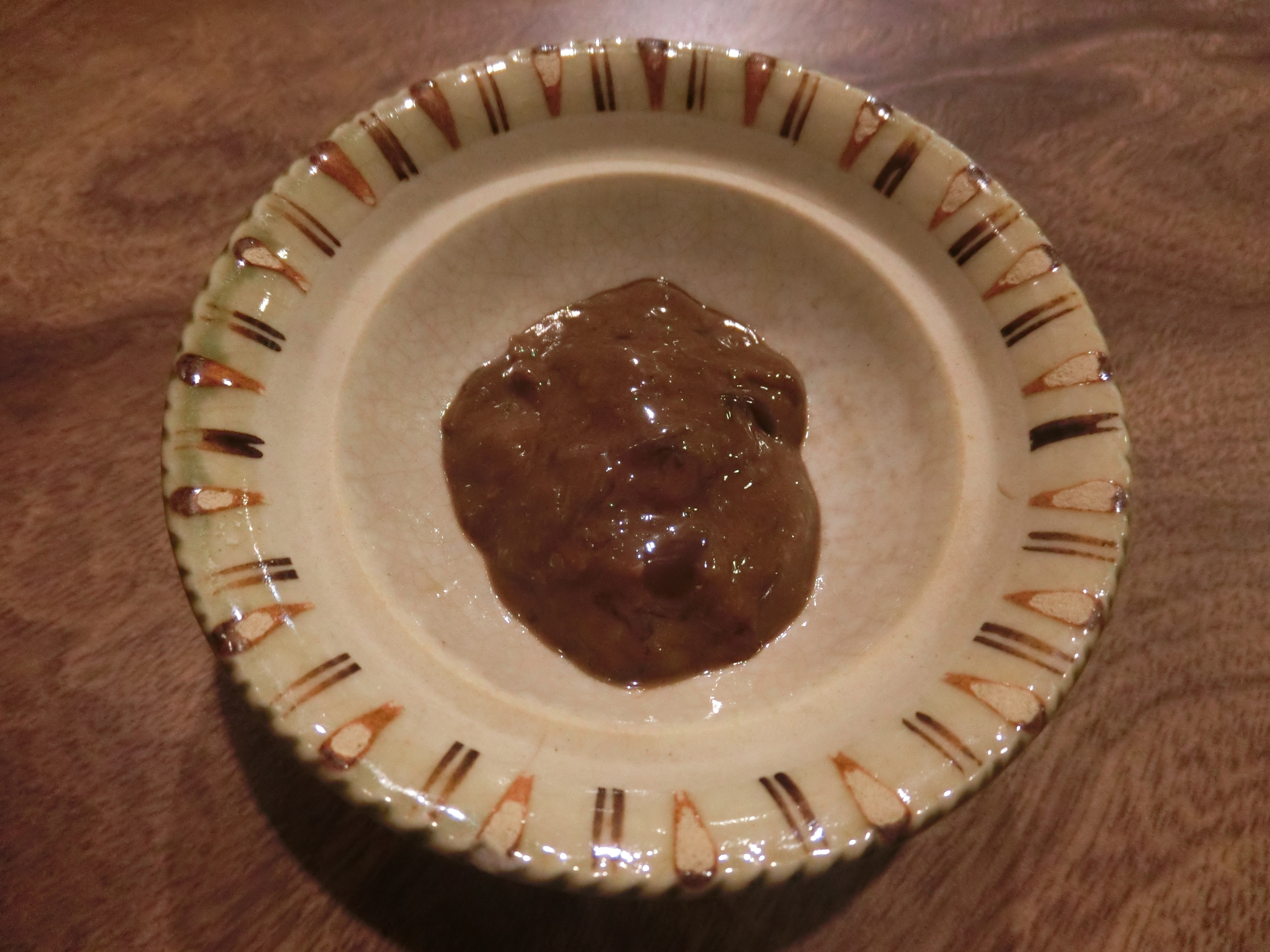 岐阜県などで作られている鮎の発酵食品、うるか。写真は郡上市で作られた渋うるか。